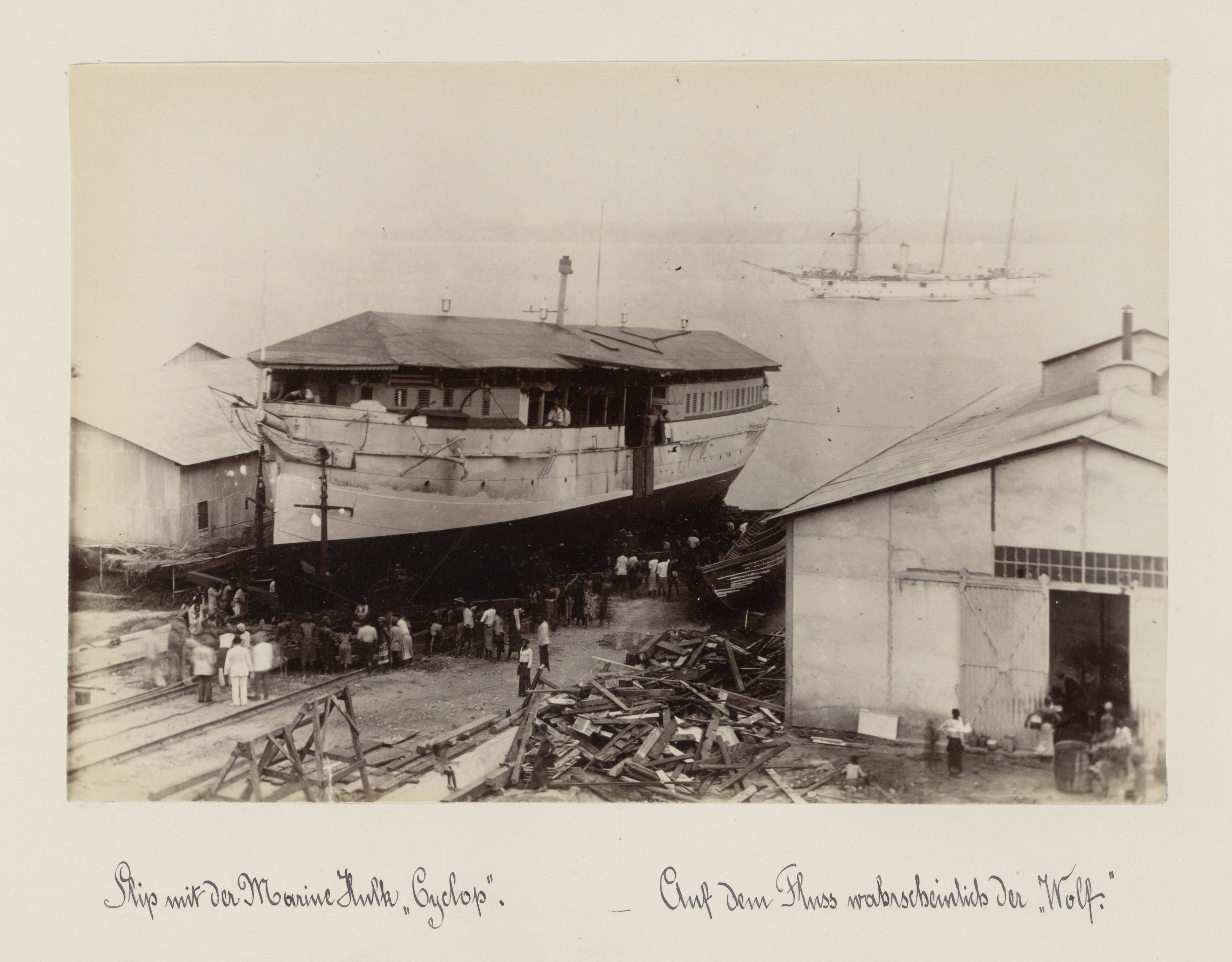 IdentificatieTitel(s): Scheepshelling in Kameroen met de schepen 'Cyclop' en (vermoedelijk) 'Wolf'Objecttype: foto Objectnummer: RP-F-F01175-POmschrijving: De 'Cyclop' was (vermoedelijk) een zogenaamde 'hulk', een afgedankt schip dat niet zeeWaar: dig was en dienst deed als handelspost. Onderdeel van Fotoalbum met opnames van Kameroen rond 1899.VervaardigingVervaardiger: fotograaf: anoniemPlaats vervaardiging: KameroenDatering: 1899Fysieke kenmerken: albuminedrukMateriaal: fotopapier Techniek: albuminedrukAfmetingen: h 134 mm × b 200 mmOnderwerpWat: shipyard, shipdockWaarKameroenVerwerving en rechtenVerwerving: overdracht van beheer 1994Copyright: Publiek domein